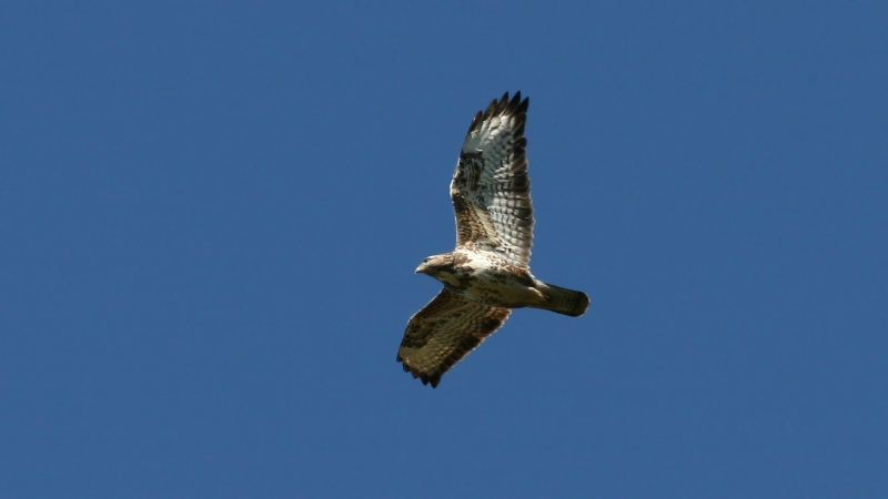 Buzzard (Buteo buteo)